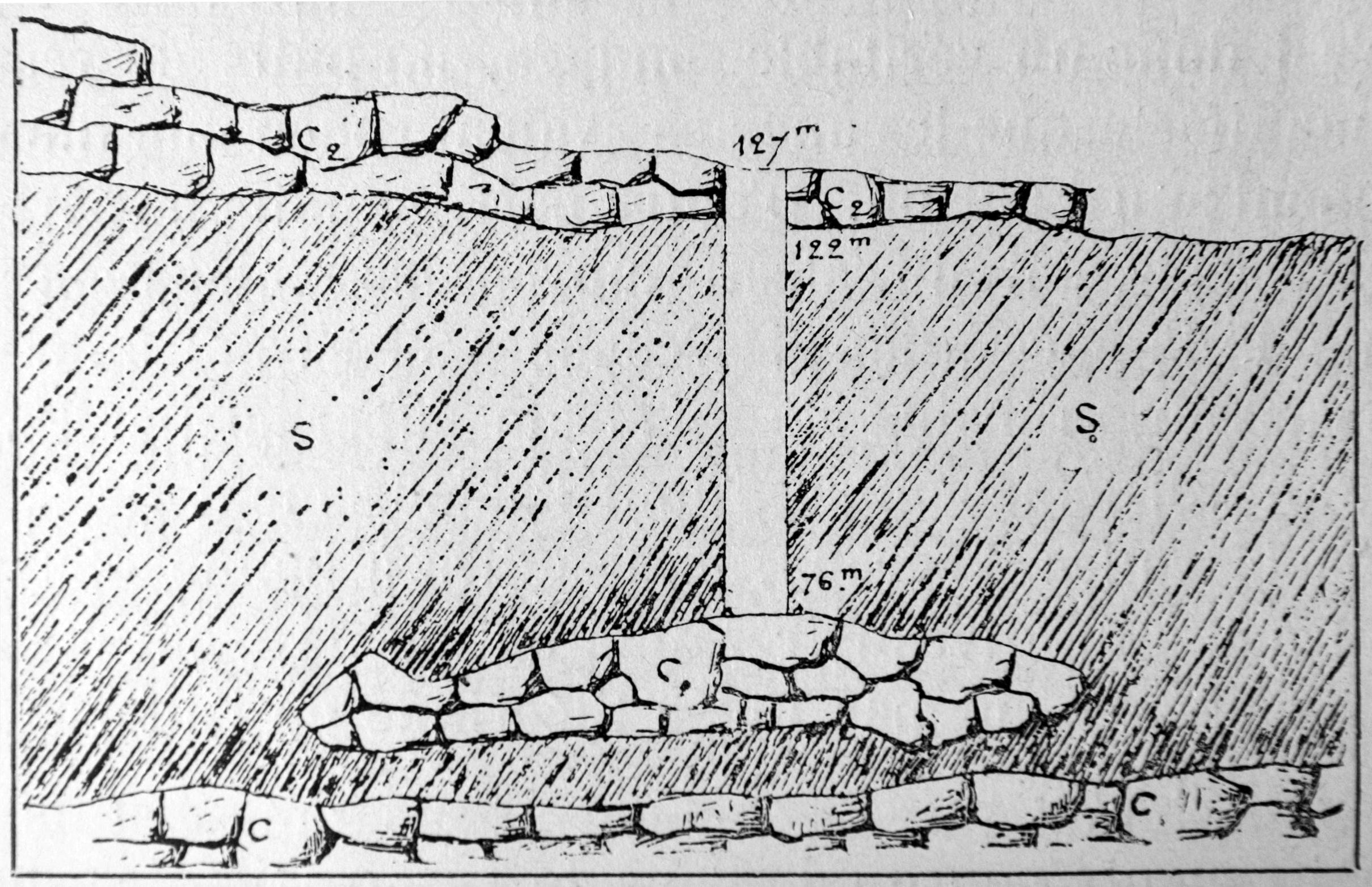 Schéma du Puits Kitzo au Laurion ; photographie d'une illustration de l'ouvrage libre de droit Edouard Ardaillon Les mines du Laurion dans l'Antiquité, Fontemoing, Paris, 1897, p. 39